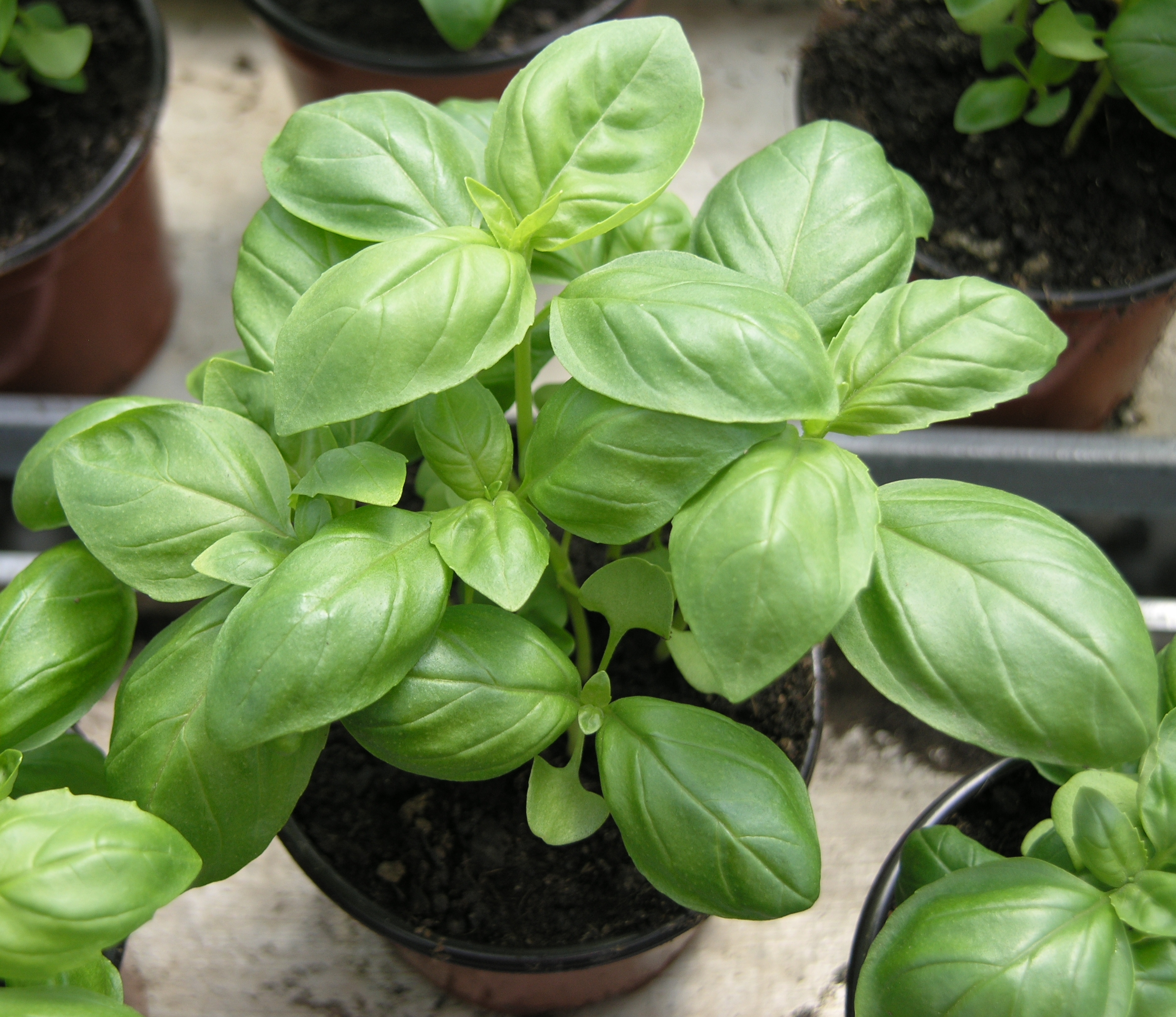 Basilikum großblättriger Genoveser